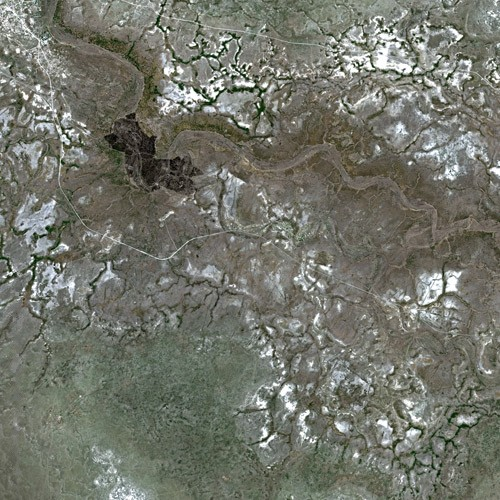 Lake Makgadikgadi by SPOT Satellite